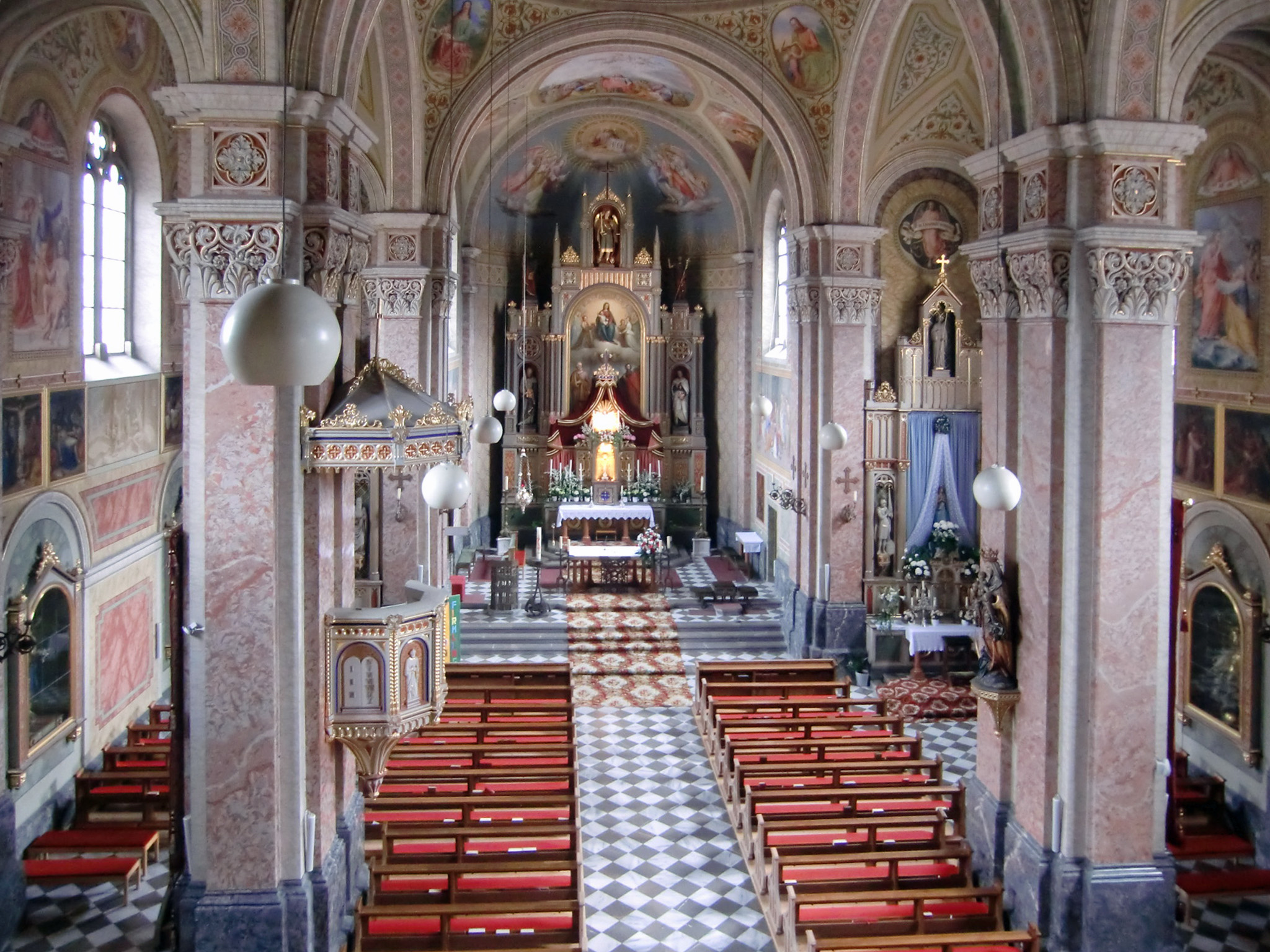 Kath. Pfarrkirche hll. Petrus und Paulus, Silz.Wand- und Deckengemälde von Heinrich Kluibenschedl